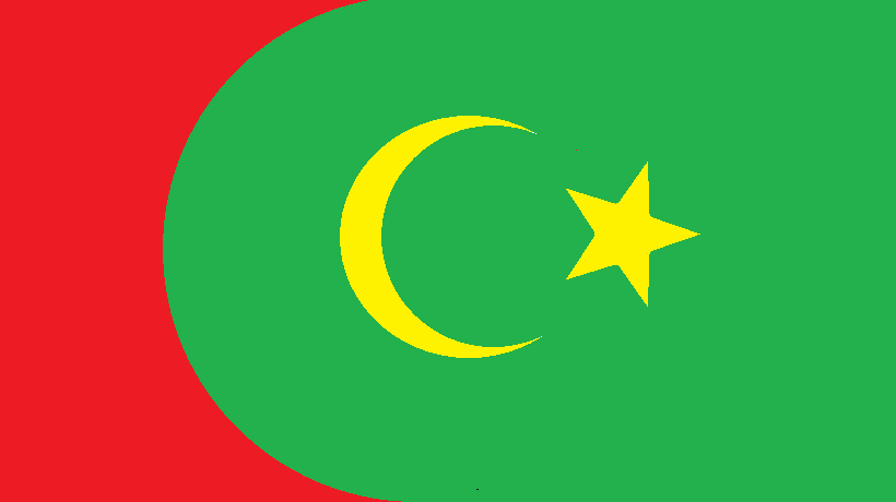 Skopye türklərinin bayrağı